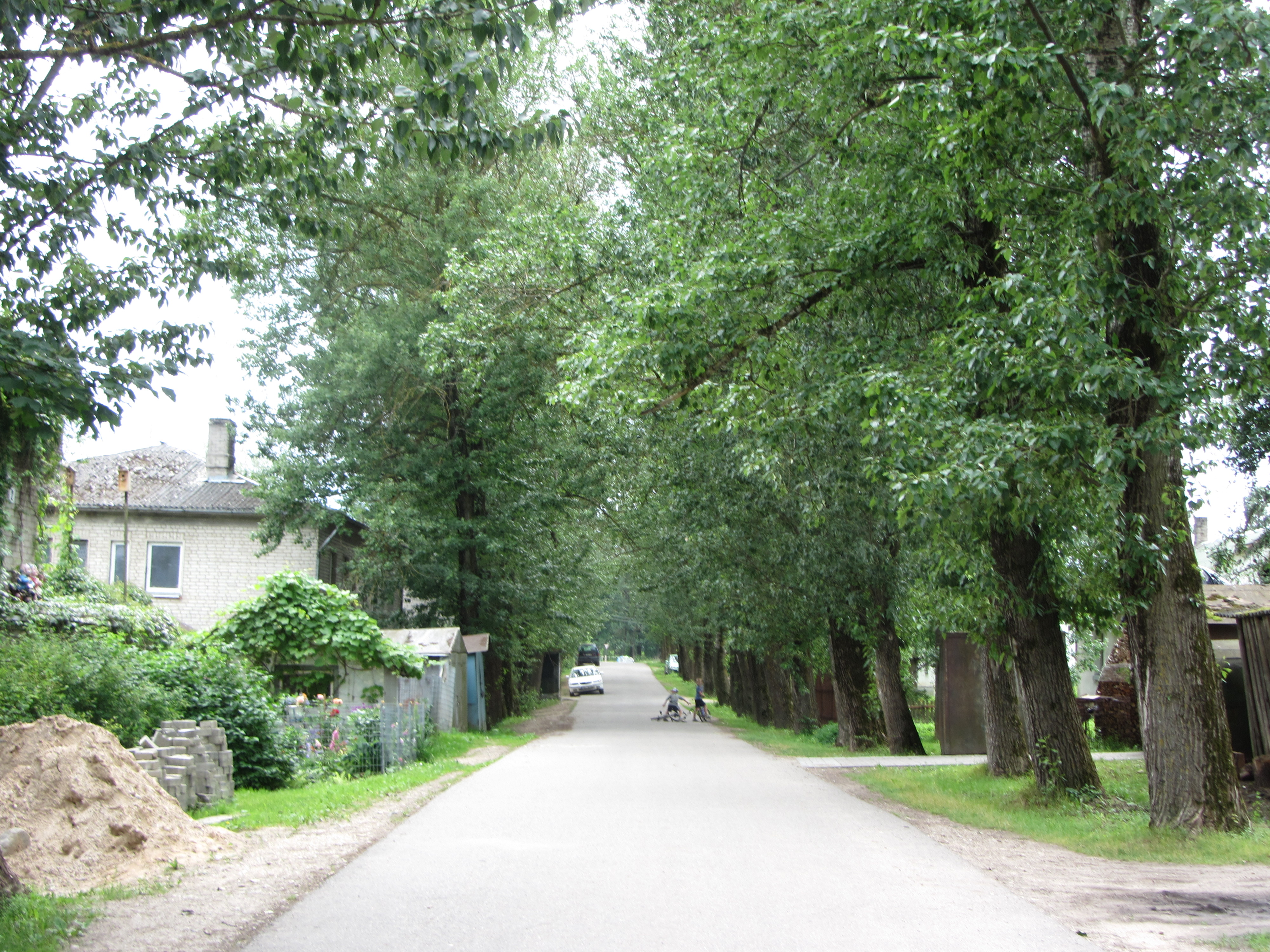 Paberžė, Lithuania